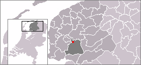 Locatie van Goingarijp, zelf gemaakt uit sjabloon van Wikipedia-gebruiker Mtcv